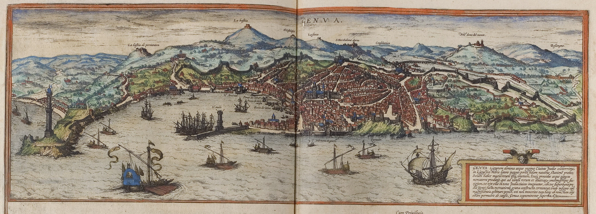 Genova